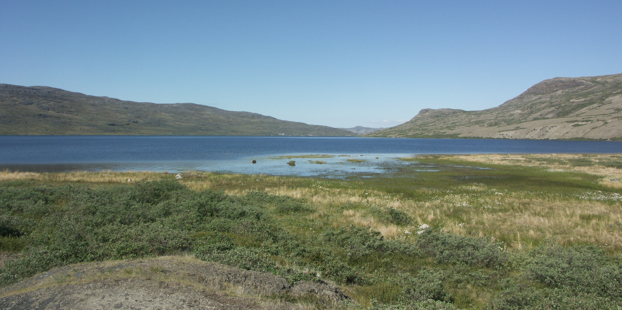 Lake Tasersuatsiaq (Ferguson), Kangerlussuaq, Qeqqata, Greenland